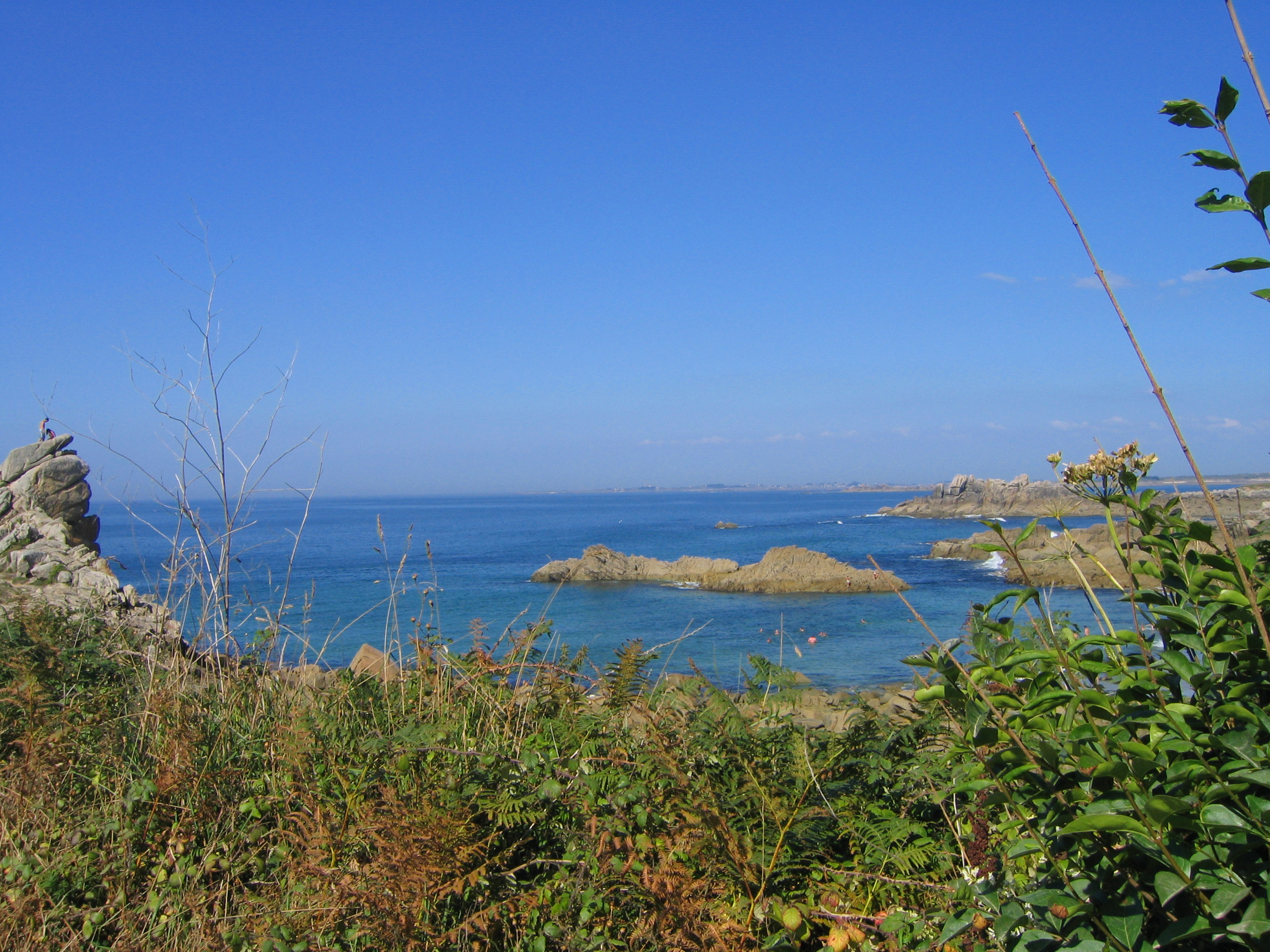 Une plage